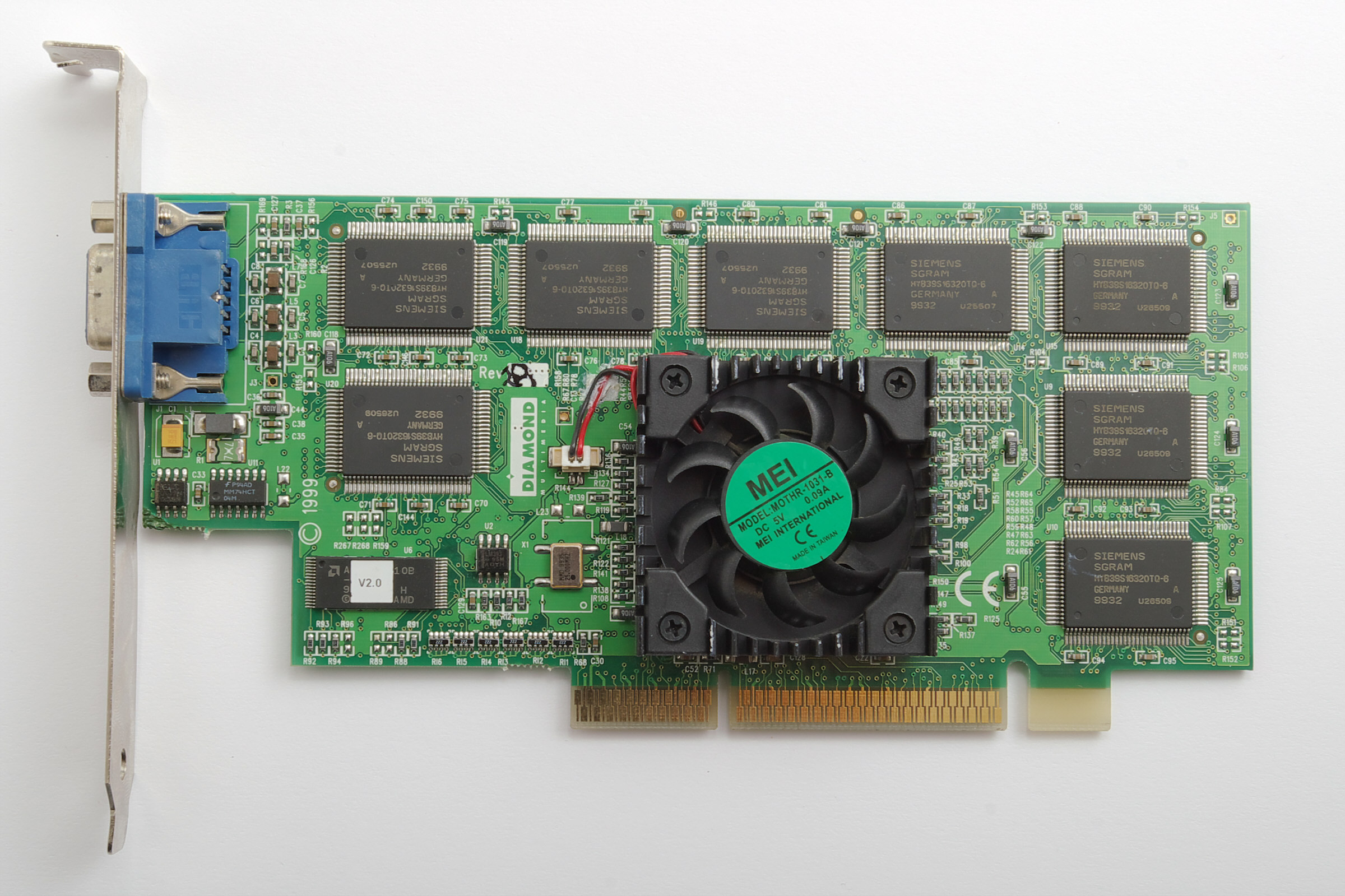 Diamond FireGL1 AGP Vorderseite